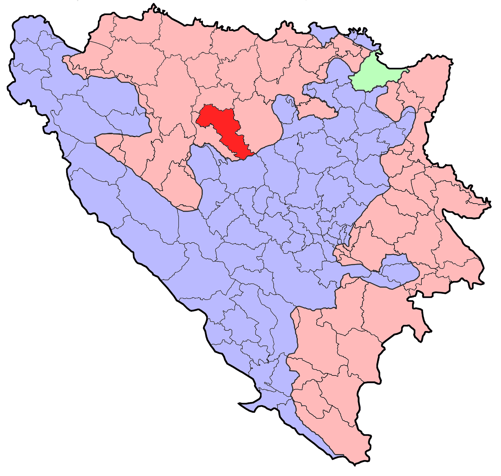 Republika Srpska (BiH) municipality